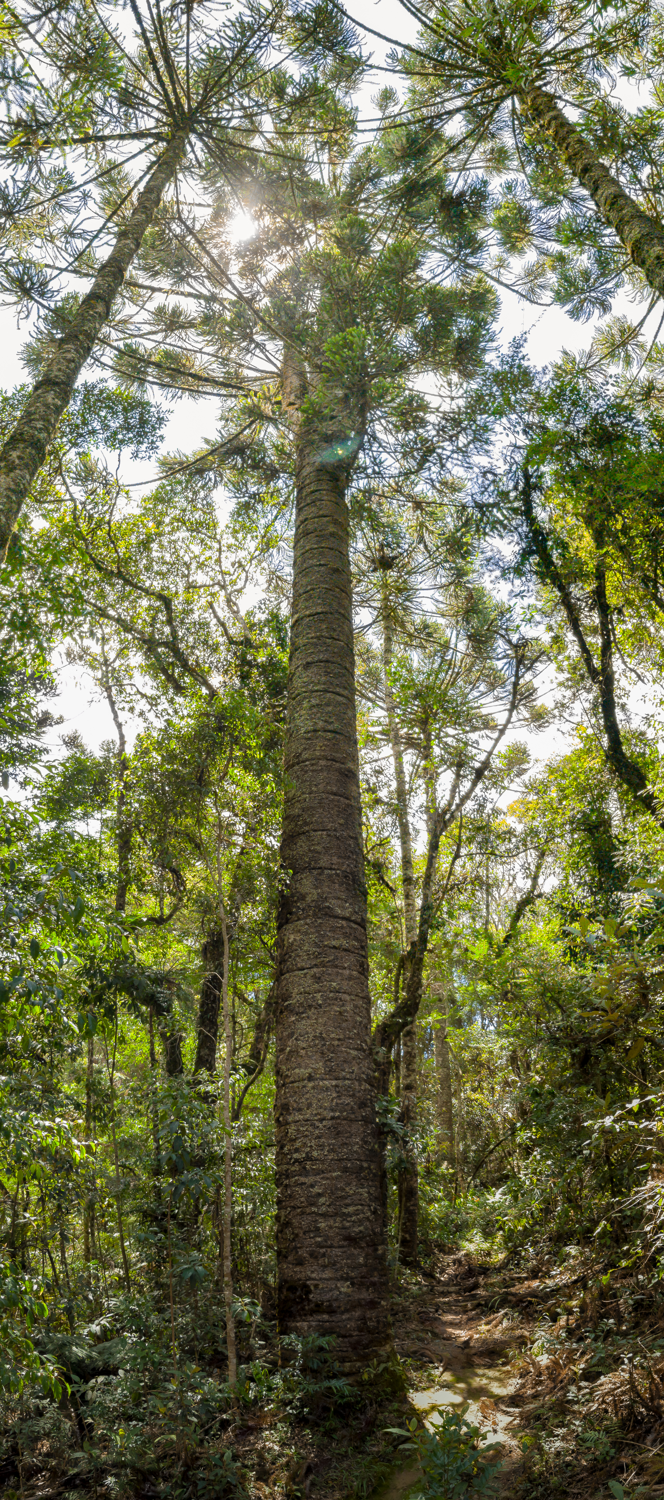 Pinheiro velho